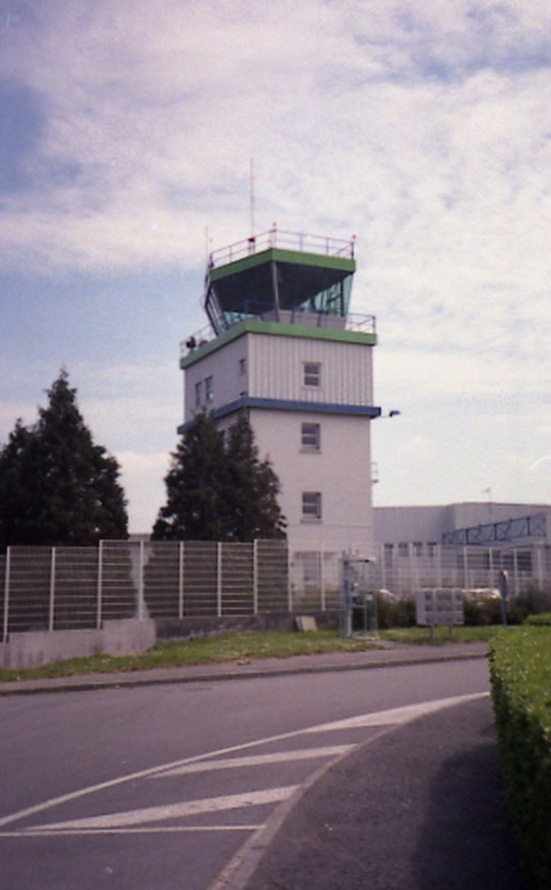 Tour de contrôle de l'aéroport de Quimper-Cornouaille (LFRQ)